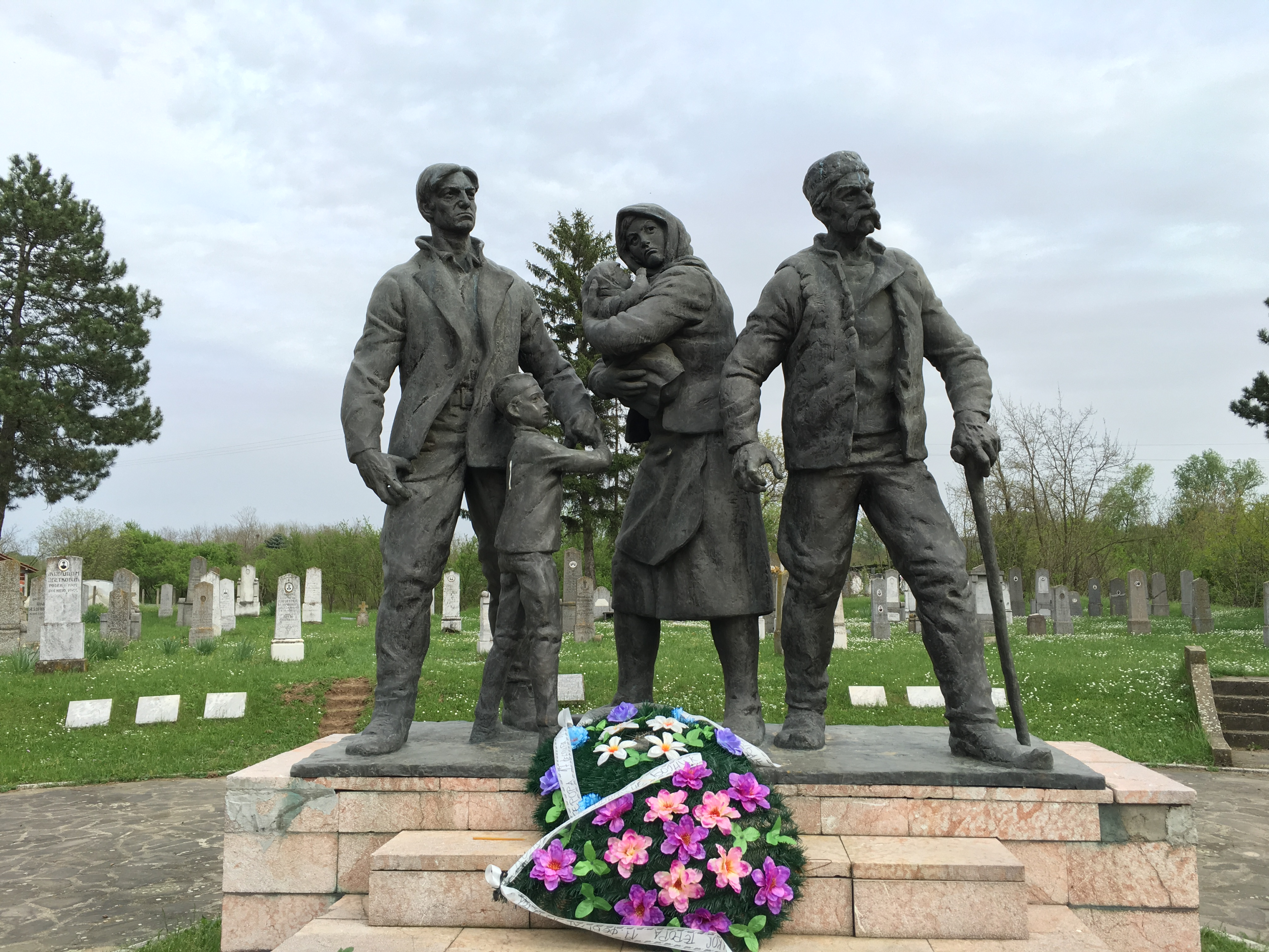 Srpski (latinica): Spomen groblje u Bojniku.